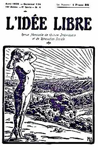 L’Idée libre est un journal libertaire et une maison d'éditions, fondés le 1er décembre 1911 par André Lorulot.